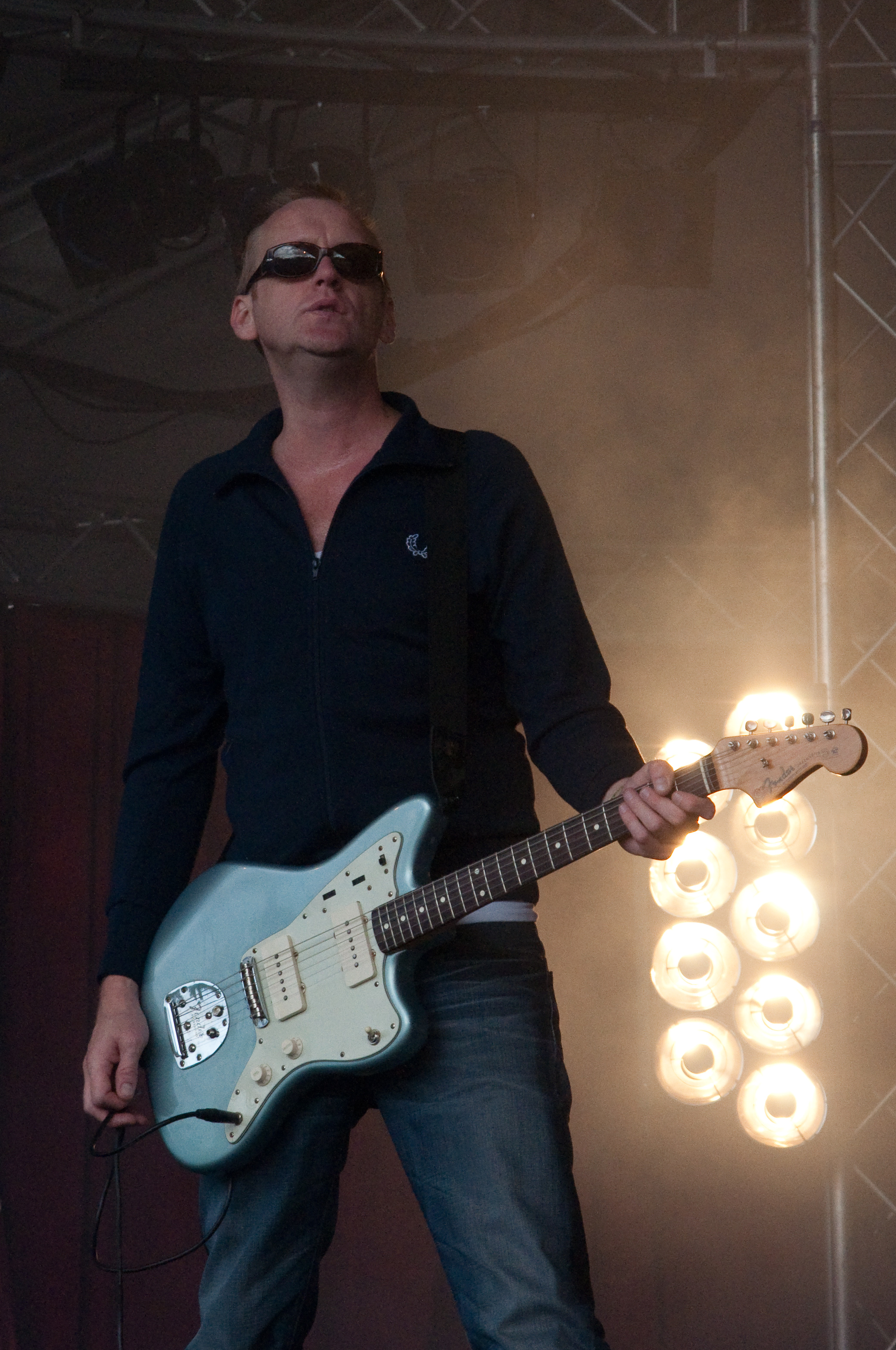 Hun laatste festivaloptreden. Into The Great Wide Open op Vlieland van 4 tot en met 6 september 2009.